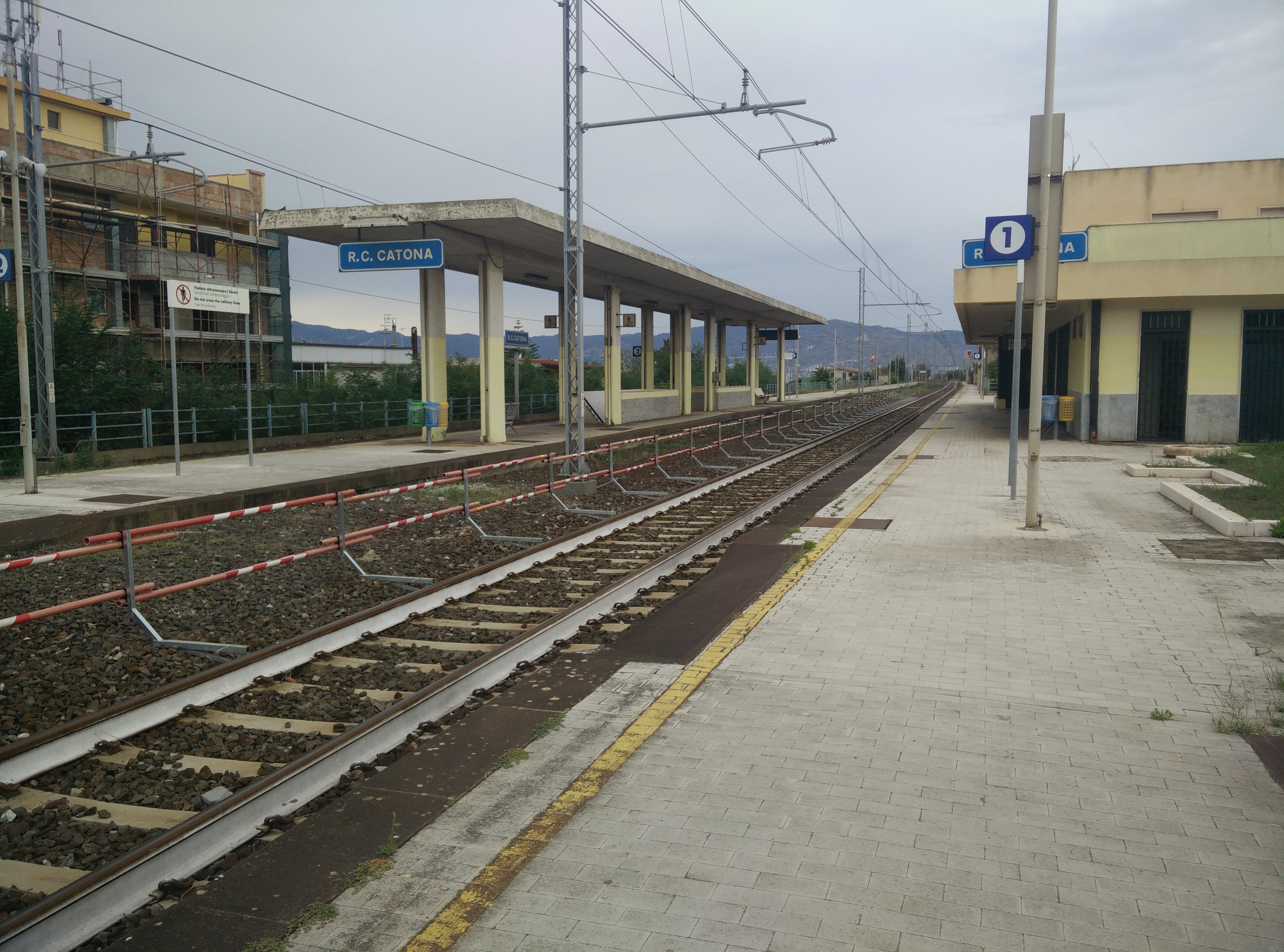 Vista dei binari della stazione di RC Catona